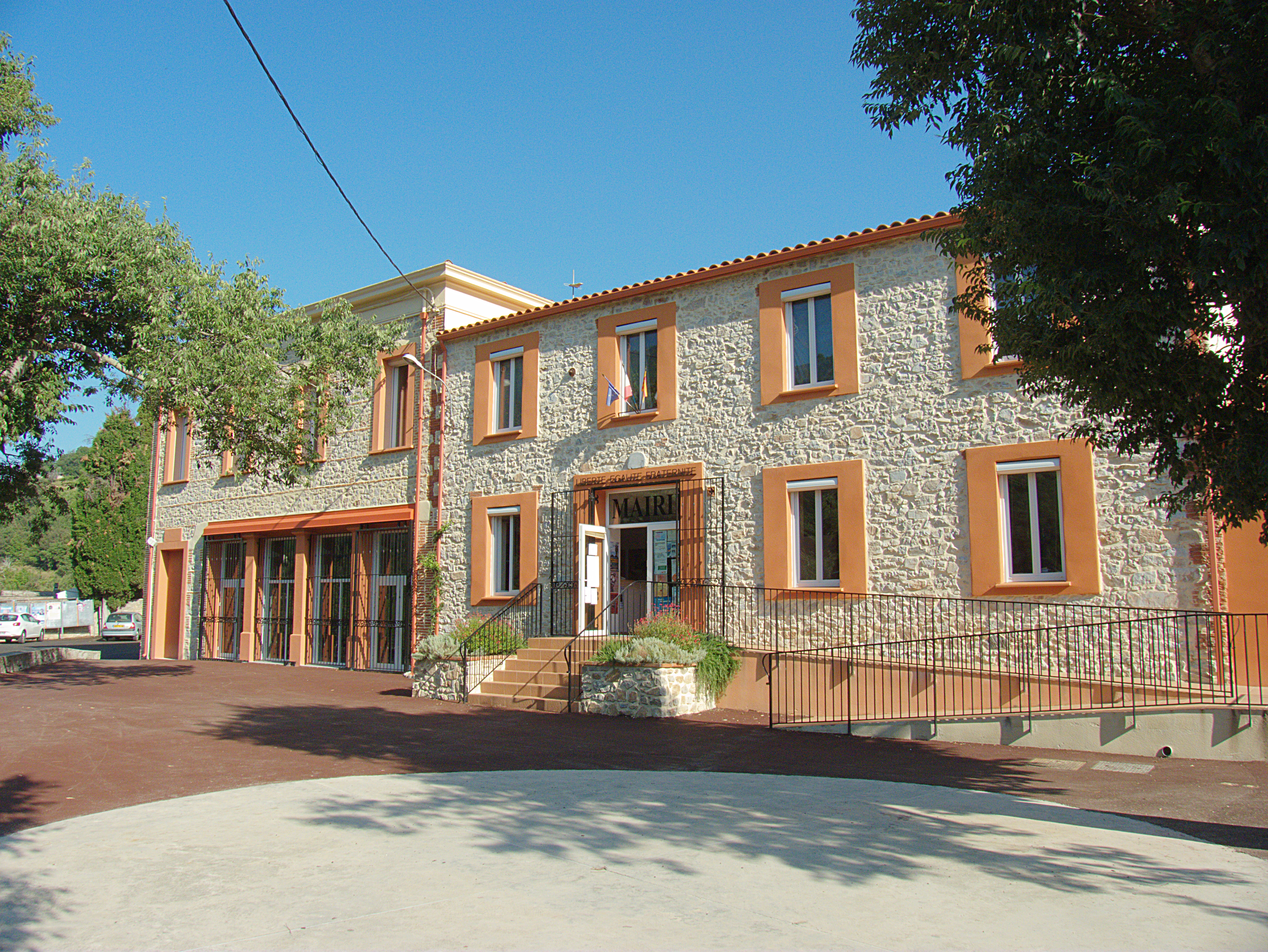 Mairie, Reynès (Pyrénées-Orientales, Languedoc-Roussillon, France)